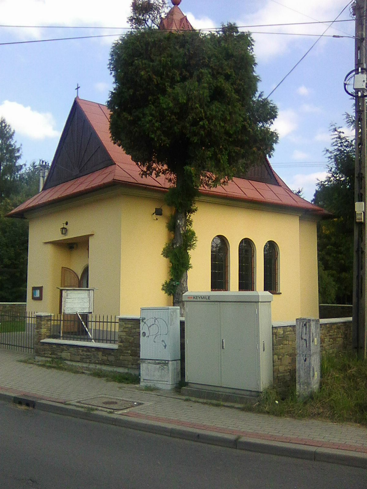 Kaplica w Żywcu - Sporyszu